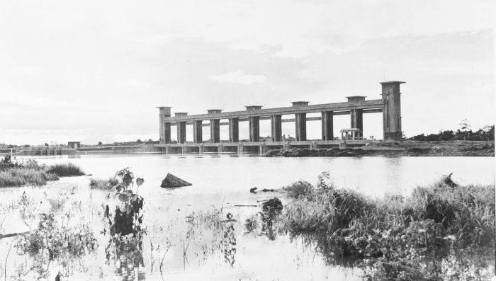 Repronegatief. Brug en sluis in de Tjisadane (Cisadane) bij Tangerang ten westen van Batavia.